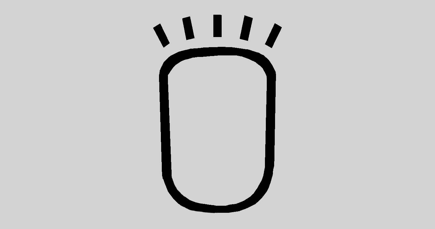 Typologie der podomorphen Petrosomatoglyphen auf Lanzarote nach Hans-Joachim Ulbrich